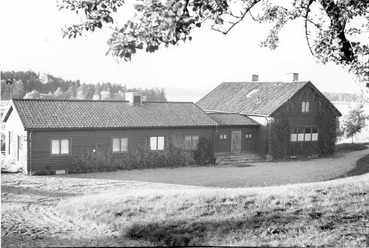 Baset, anläggningen vid Mälaren från sydöst, Järfälla kommun, tillhörde Görvälns gård. Det var Karl Salins sommarbostad, uppfördes omkring 1937-1938. Järfälla kommuns bilddatabas. Bild nr 00121.